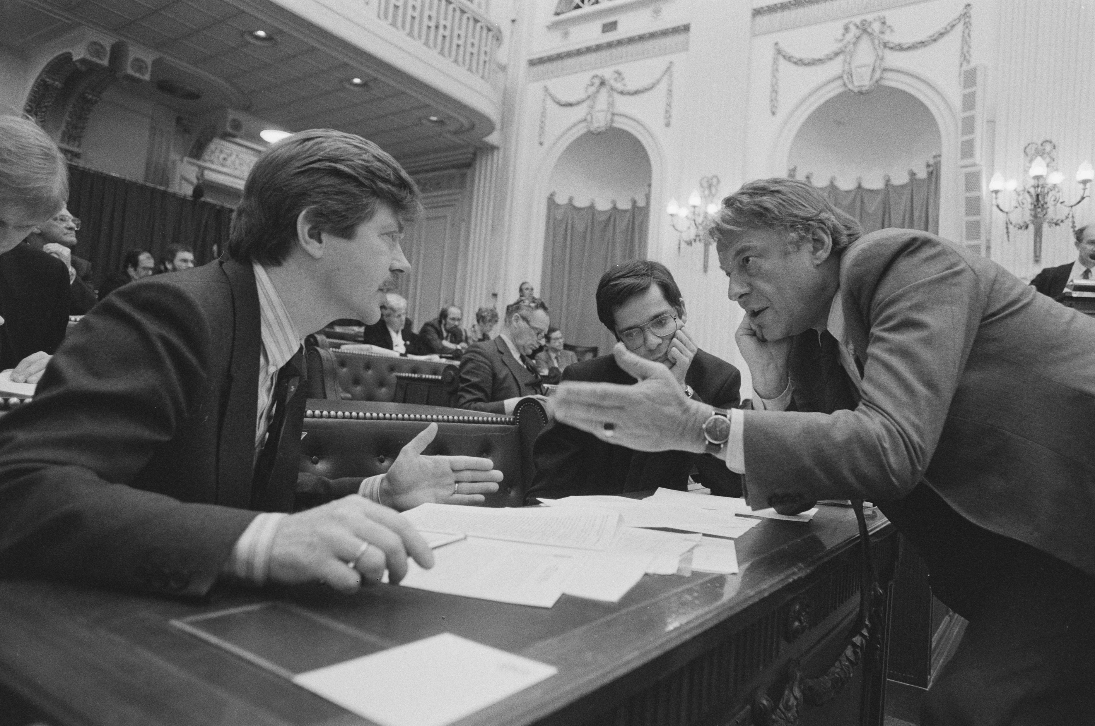 Collectie / Archief : Fotocollectie Anefo Reportage / Serie : [ onbekend ] Beschrijving : Tweede Kamer debat over voorjaarsoverleg van 2 juni j.l. Van Mierlo (r) i.g.m. Voorhoeve (l) en De Grave (m) Datum : 11 juni 1987 Trefwoorden : politiek Persoonsnaam : Grave, Frank de, Mierlo, H.A.F.M.O. van, Voorhoeve, Joris Fotograaf : Bogaerts, Rob / Anefo Auteursrechthebbende : Nationaal Archief Materiaalsoort : Negatief (zwart/wit) Nummer archiefinventaris : bekijk toegang 2.24.01.05 Bestanddeelnummer : 934-0092